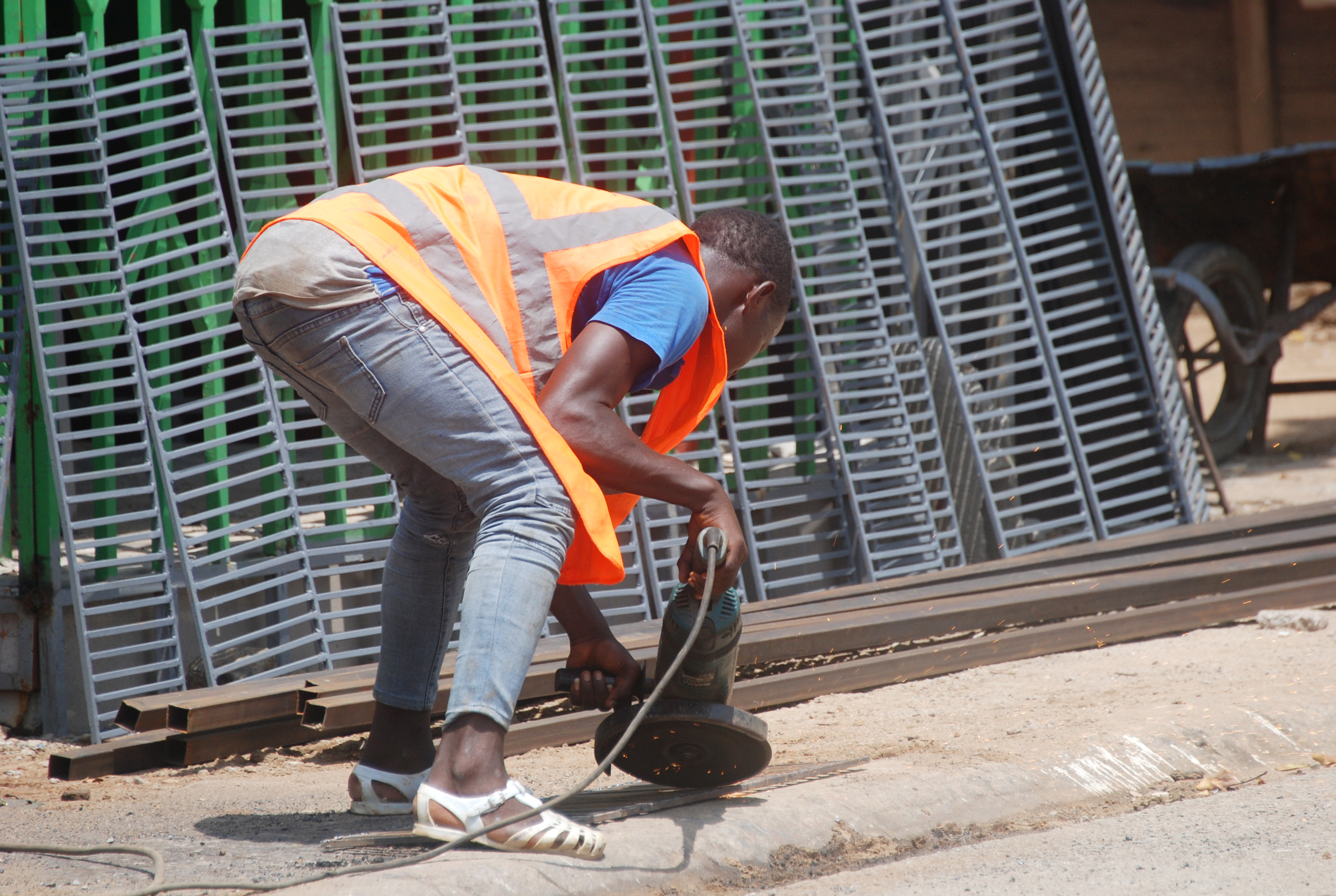 Un ferronnier en plein travail dans la ville d'Abidjan. This is an image of "African people at work" from Ivory Coast